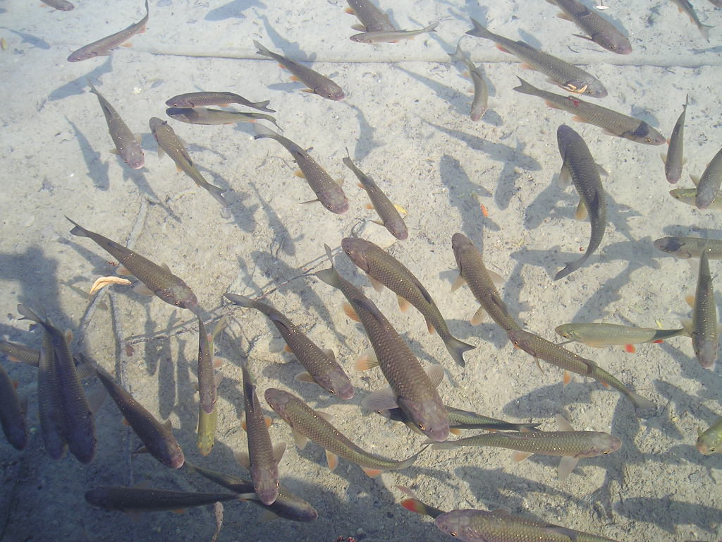 Ribe na Plitvičkim jezerima.